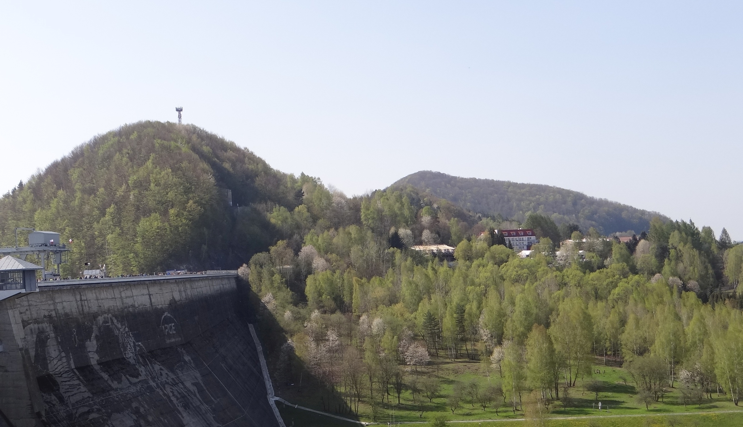 Plasza, zapora w Solinie i Berdo (po prawej stronie)